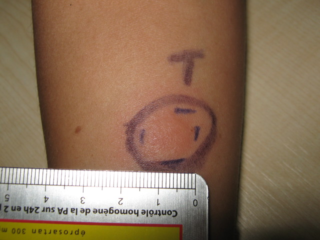 Intra dermoréaction à la tuberculine lu entre la 48e et la 72e heure : induration mesurant 15 mm